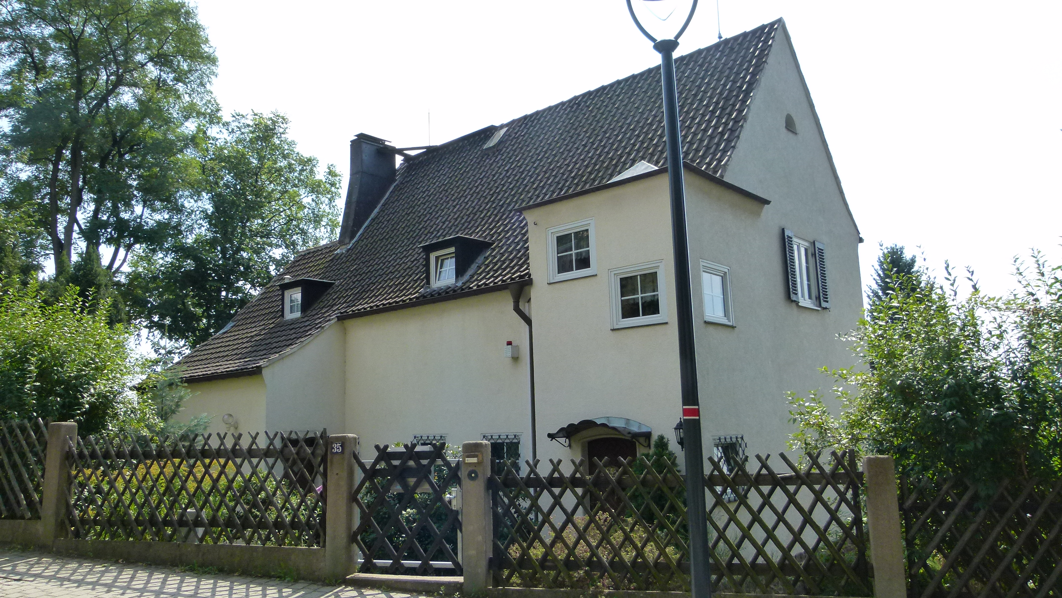 Denkmalgeschütztes Haus, Obere Bergstraße 35, Radebeul, Sachsen